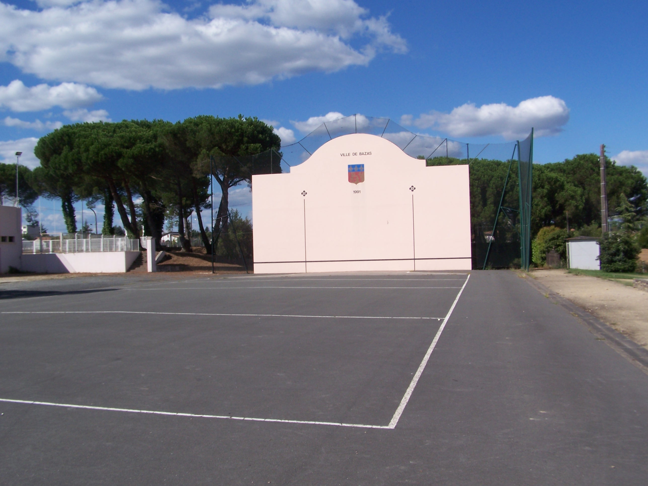 Fronton de pelote à Bazas, Gironde, France